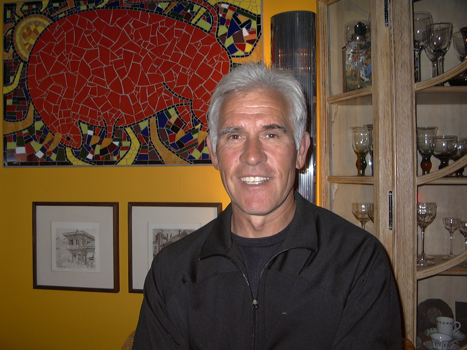 John Botica